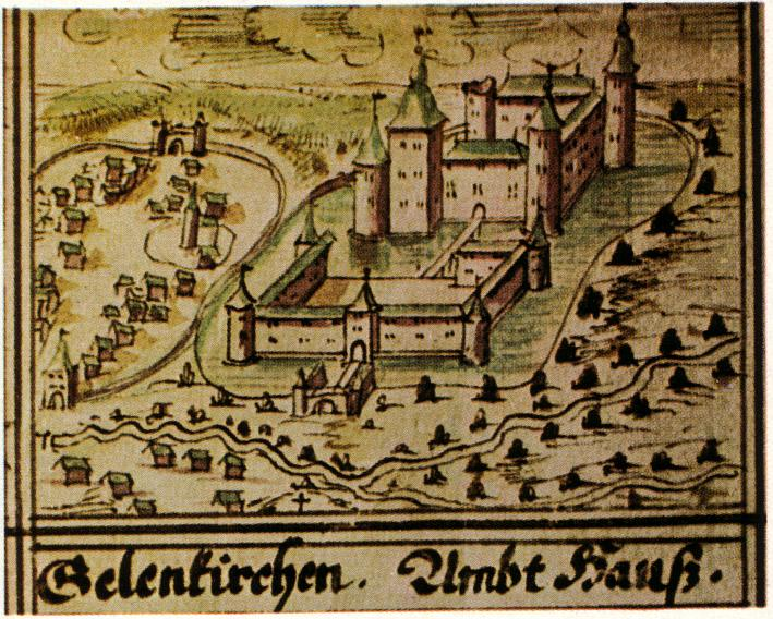 Geilenkirchen